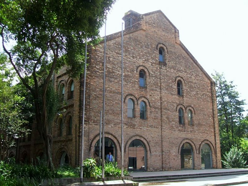 Complexo do Gasômetro, ao lado do Parque Dom Pedro II, no centro de São Paulo, Brasil.